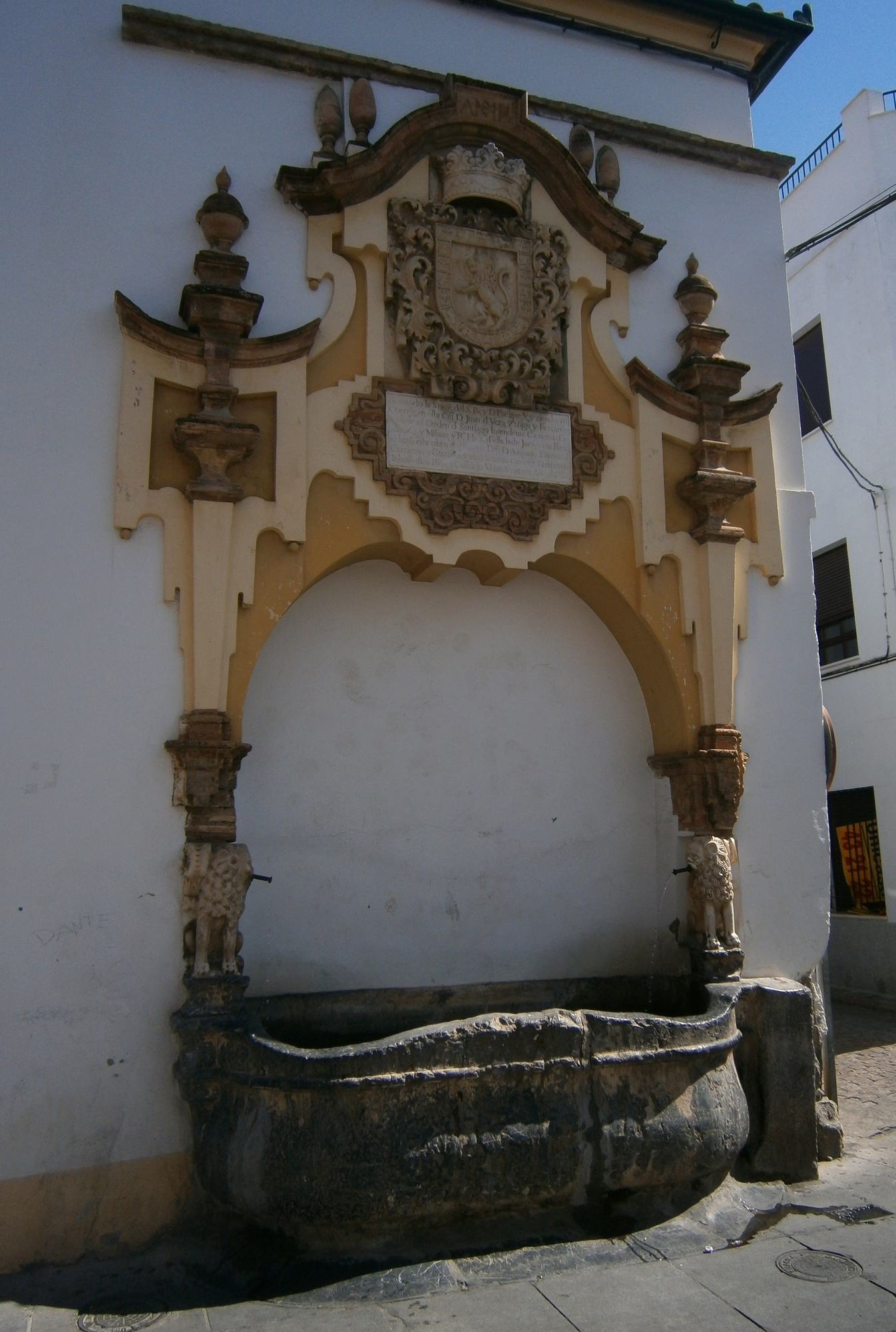 Fuente de 1721 - Córdoba